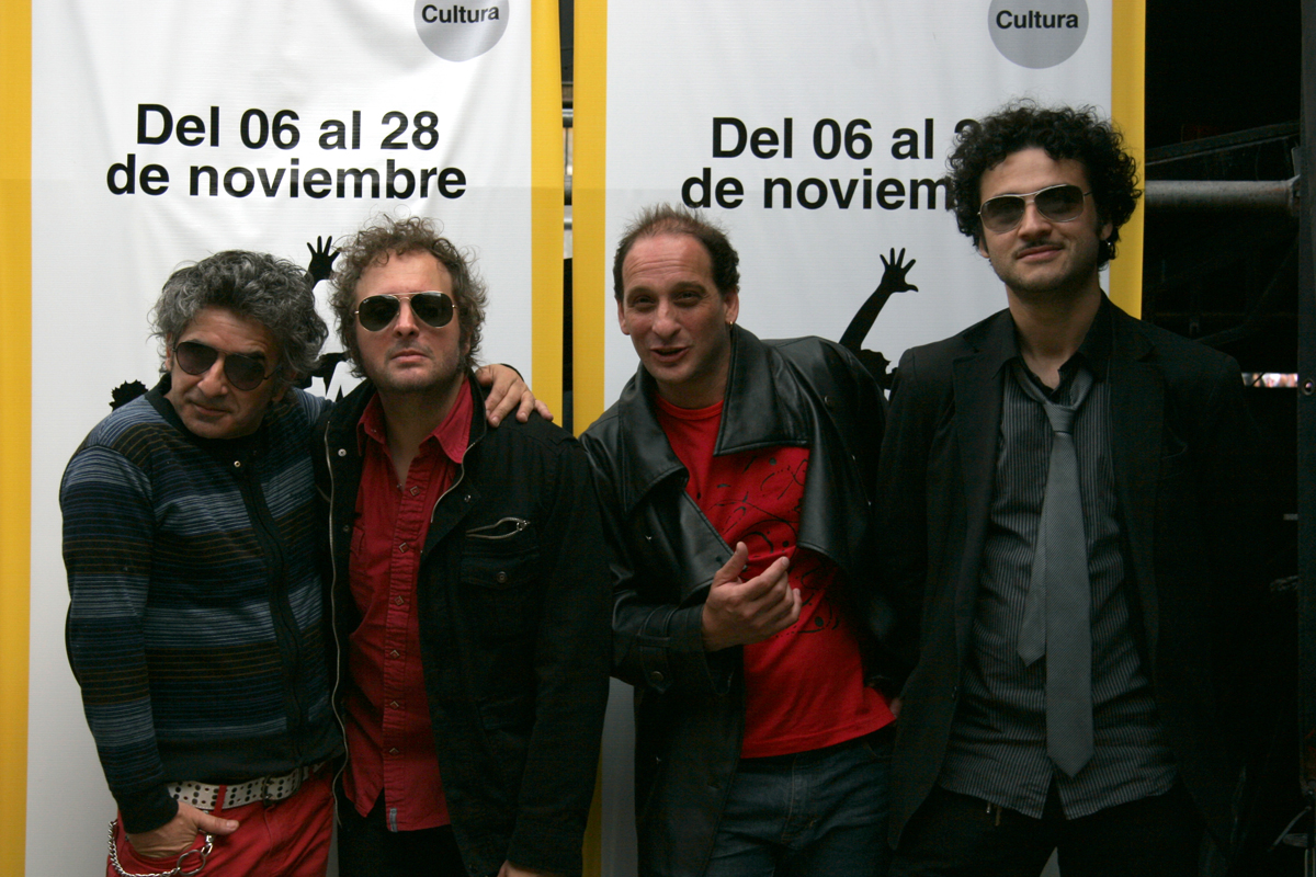 Raúl Ruffino, Walter Piancioli, Federico Bugallo y Pablo Tévez.